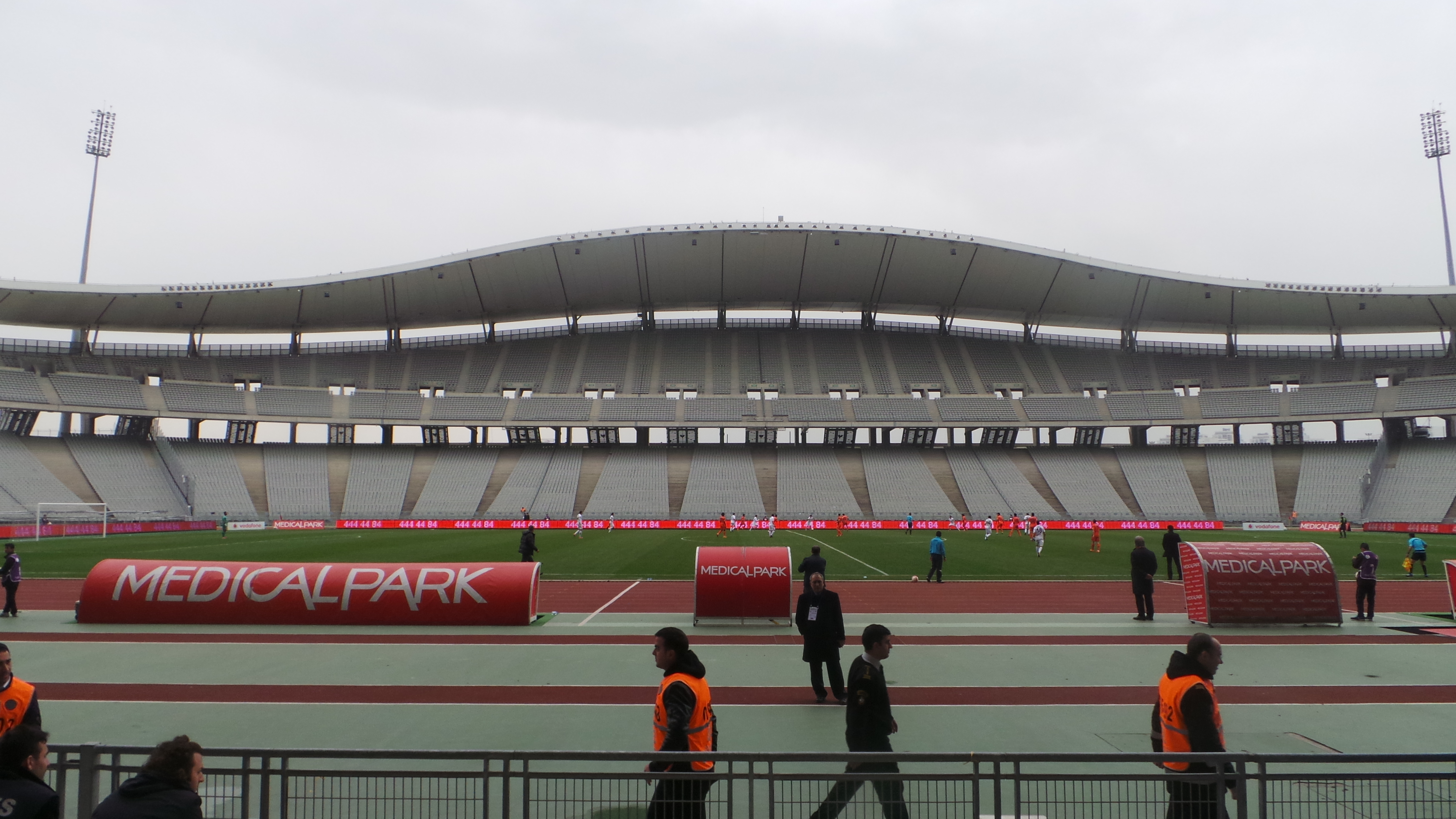 Atatürk Olimpiyat Stadyumu'14